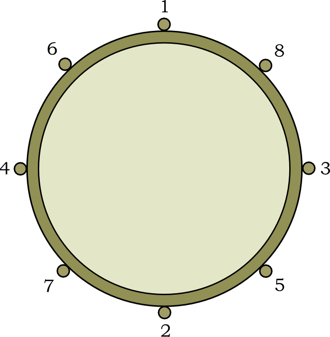 Gráfico ilustrativo para afinar un tambor de 8 tornillos.